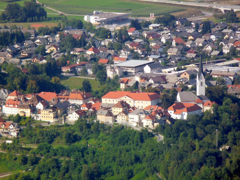 Radovljica